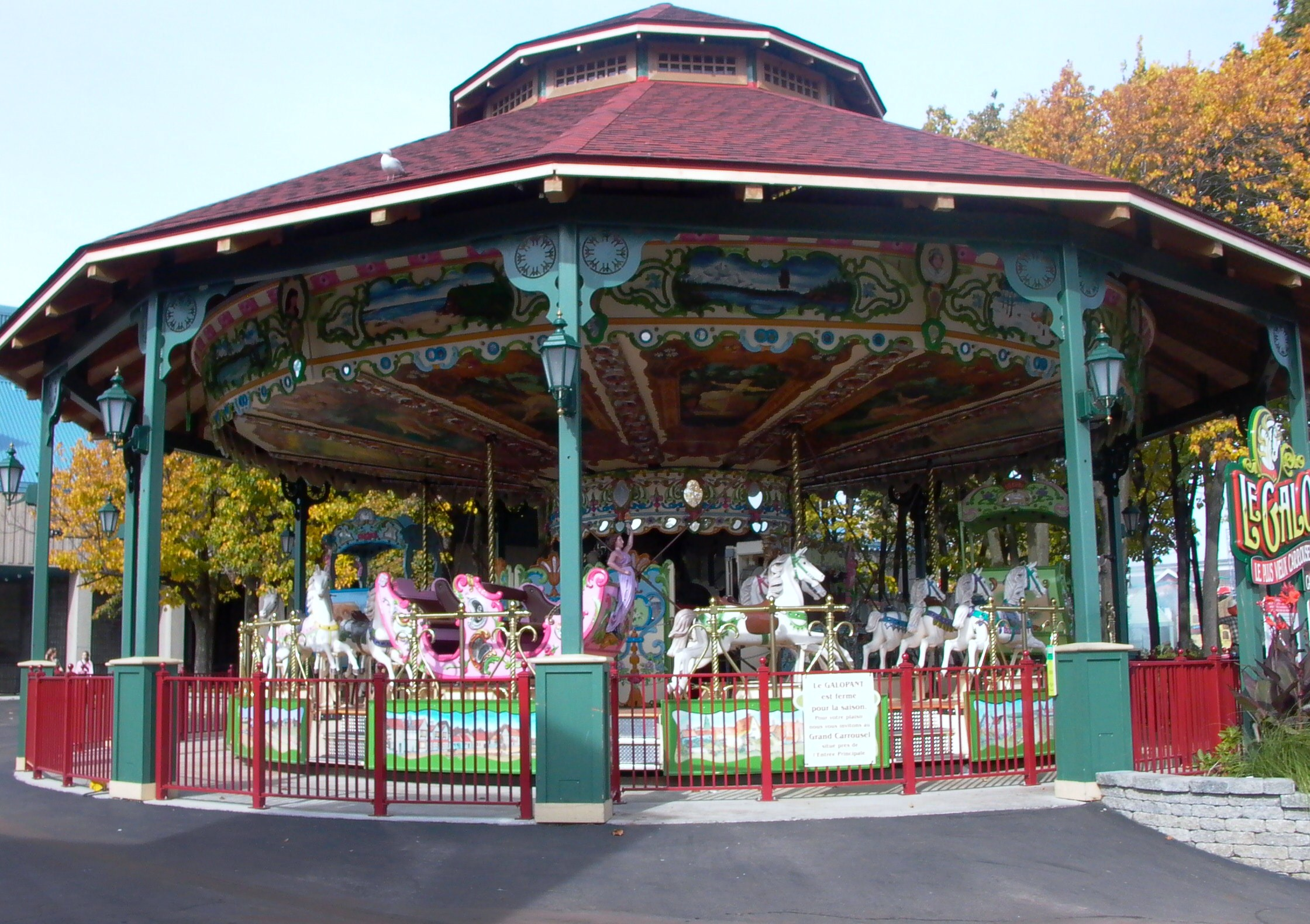 Le Galopant à La Ronde, Québec.